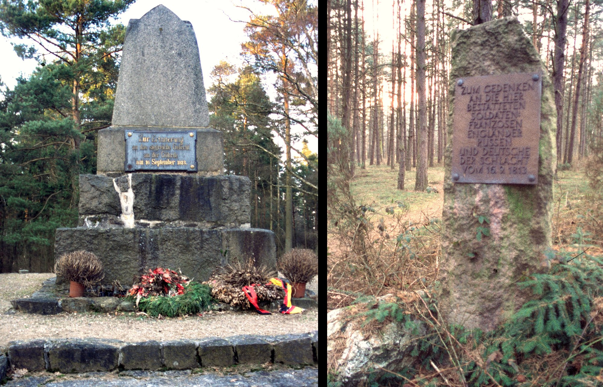 Gedenkstätten der Göhrdeschlacht